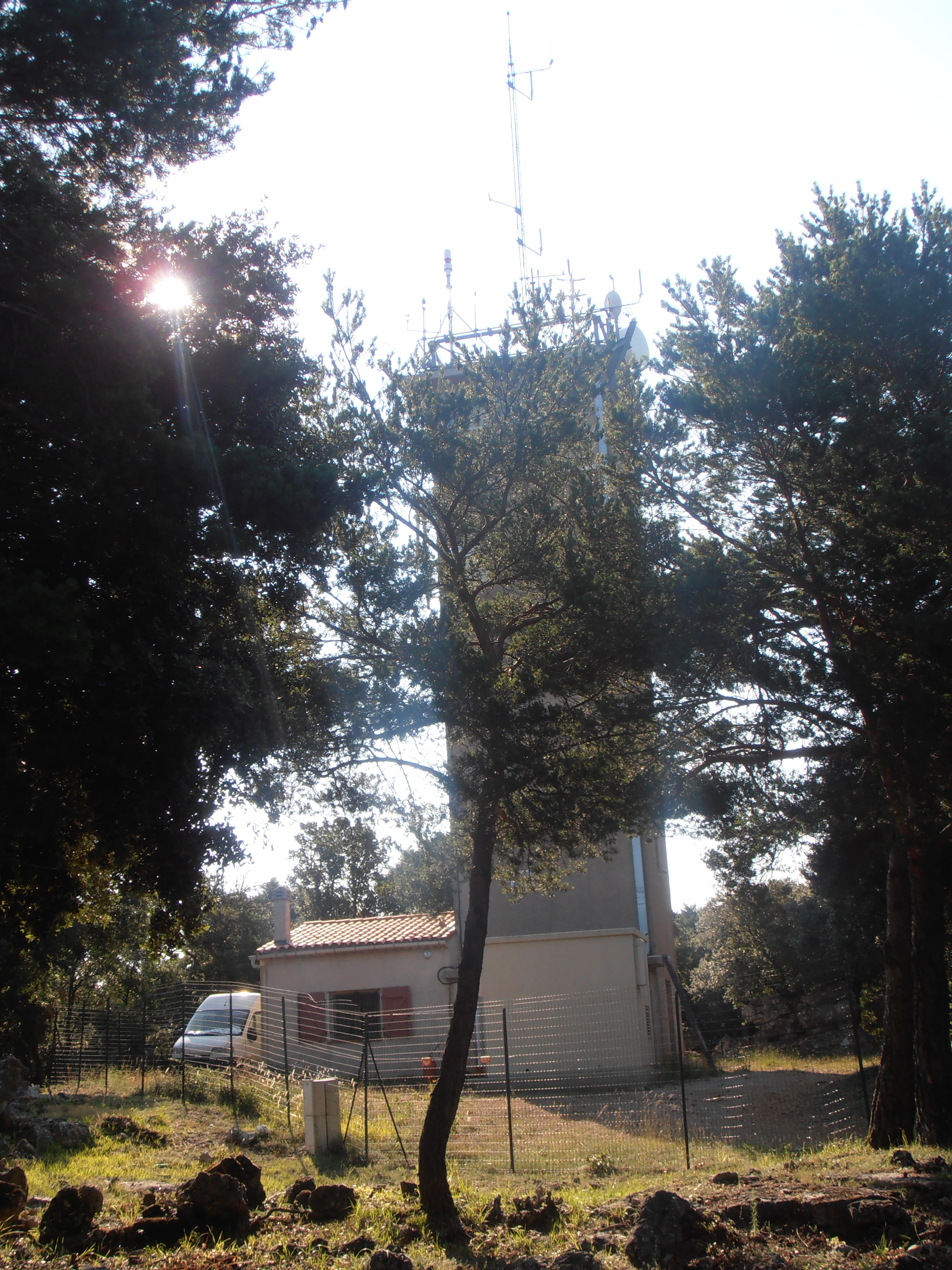 Var, Ampus, Tour de Guet » du Service Départemental d'Incendie et de Secours (SDIS) du Var ? A 856 m d'altitude et d’une hauteur de 24 mètres, elle domine le Var sur un rayon de près de 100 kms et contribue ainsi à une surveillance active et efficace de prévention des incendies de forêts